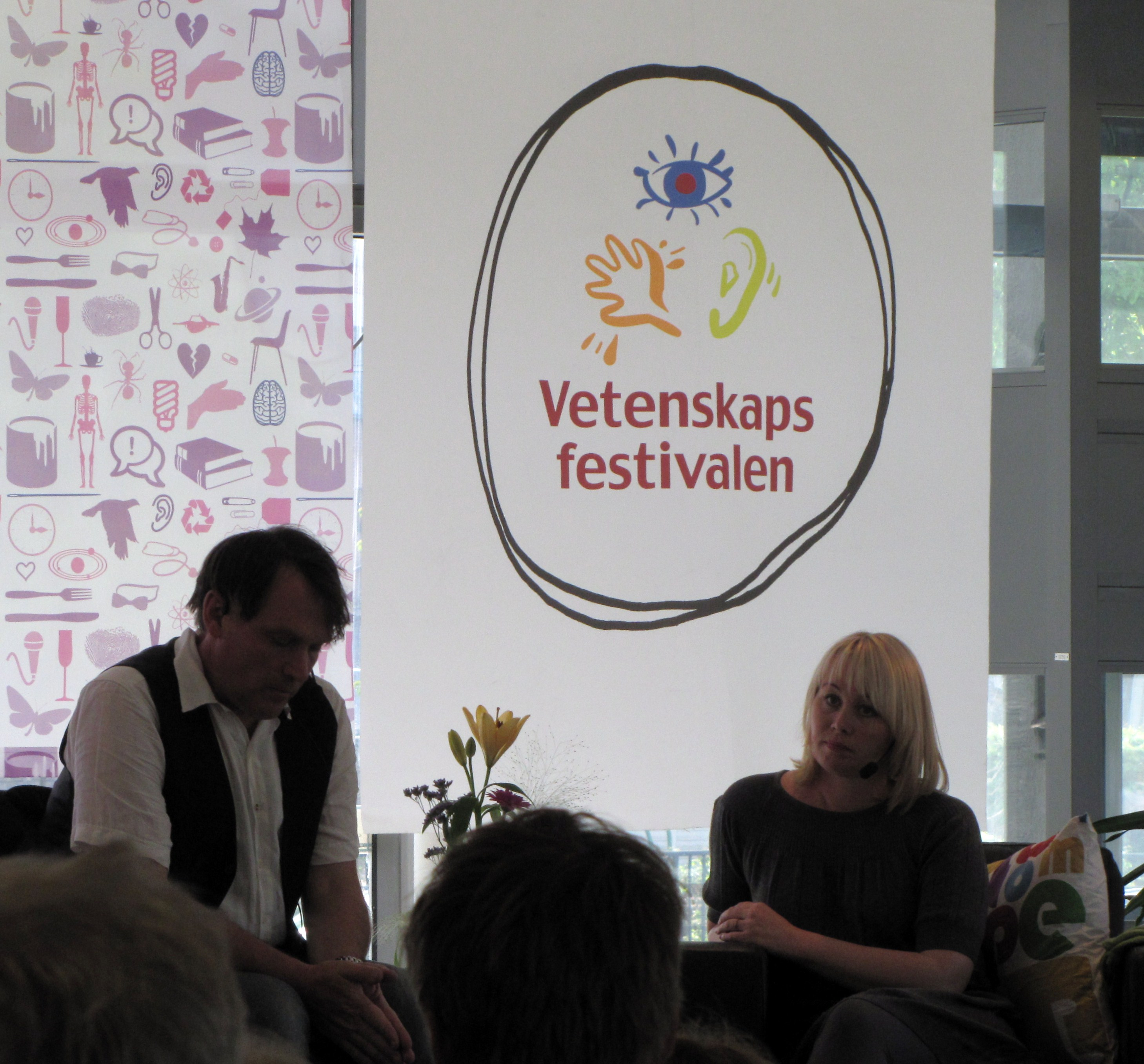 Ann Heberlein samtalar om ondska med journalisten Torgny Nordin under Vetenskapsfestivalen 2011 i Göteborg. Lokal var "Science Lounge" i Pedagogens restaurant.